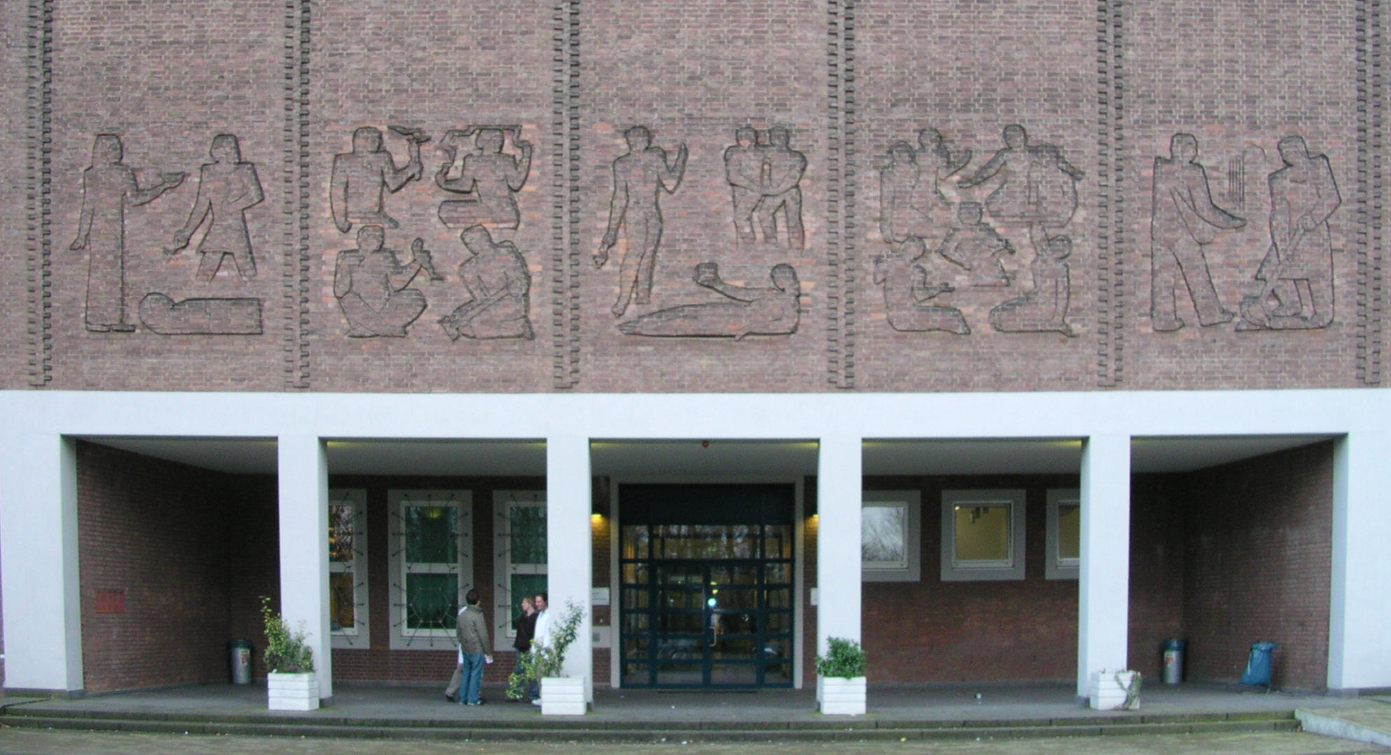 RWTH Aachen, Institut für Anorganische Chemie